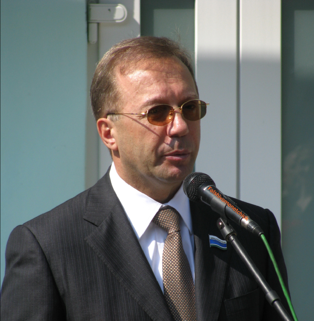 Игорь Ковпак - депутат Законодательного собрания Свердловской области и основатель сети супермаркетов "Кировский"